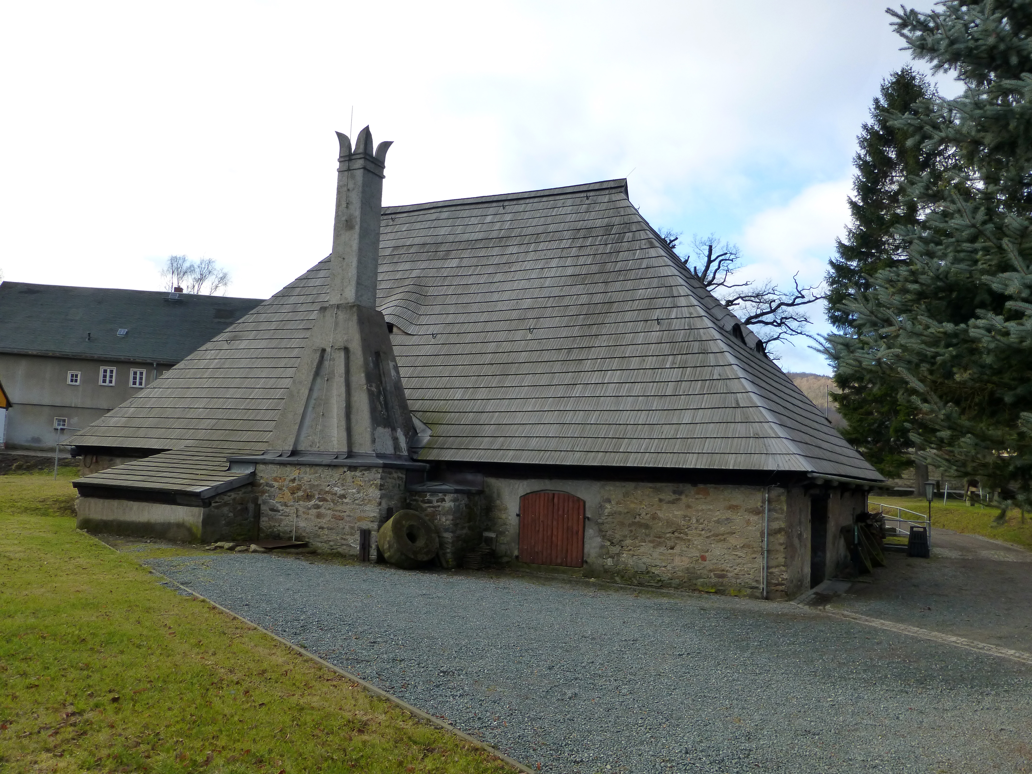 Althammer, Saigerhütte Grünthal.